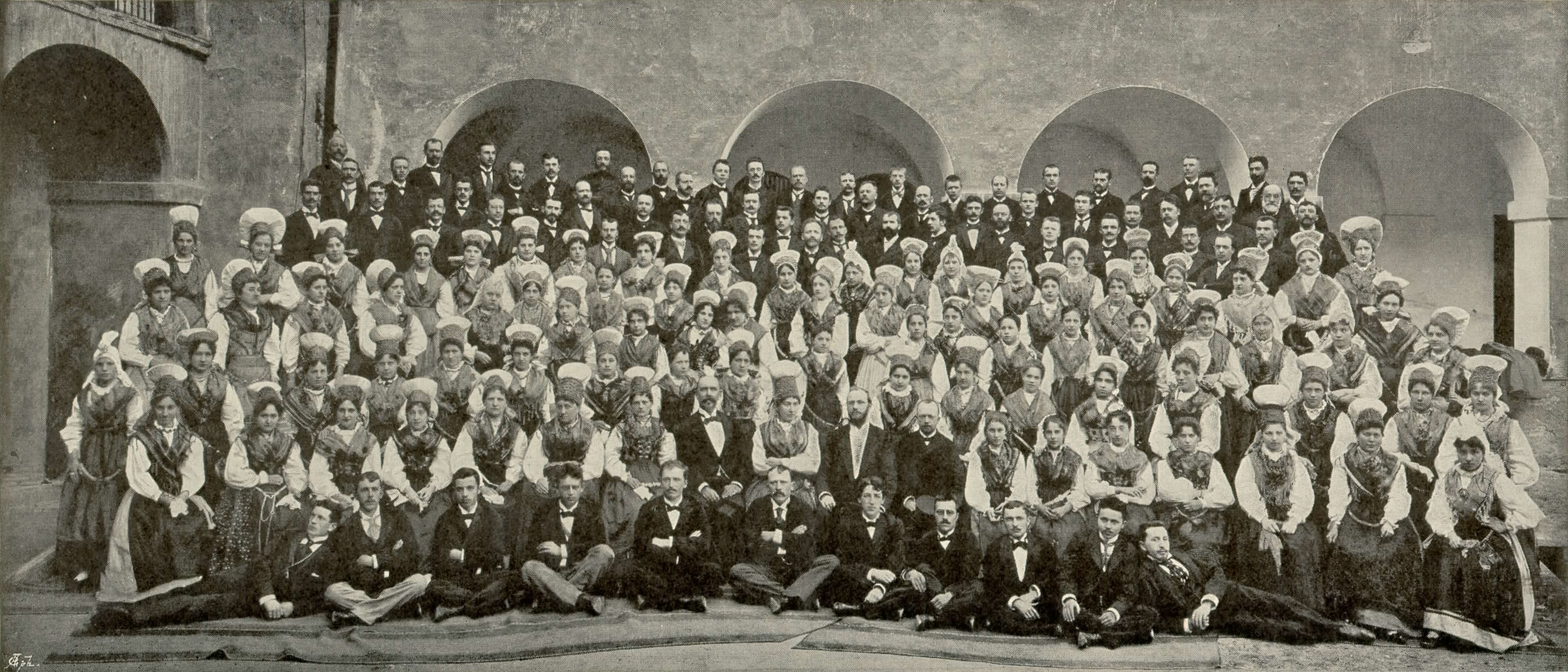 Pevski zbor Glasbene Matice na Dunaju 1896. From image: 1896 23 in 25 euecs Pevski zbor "Glasbene Matice" na Dunaju